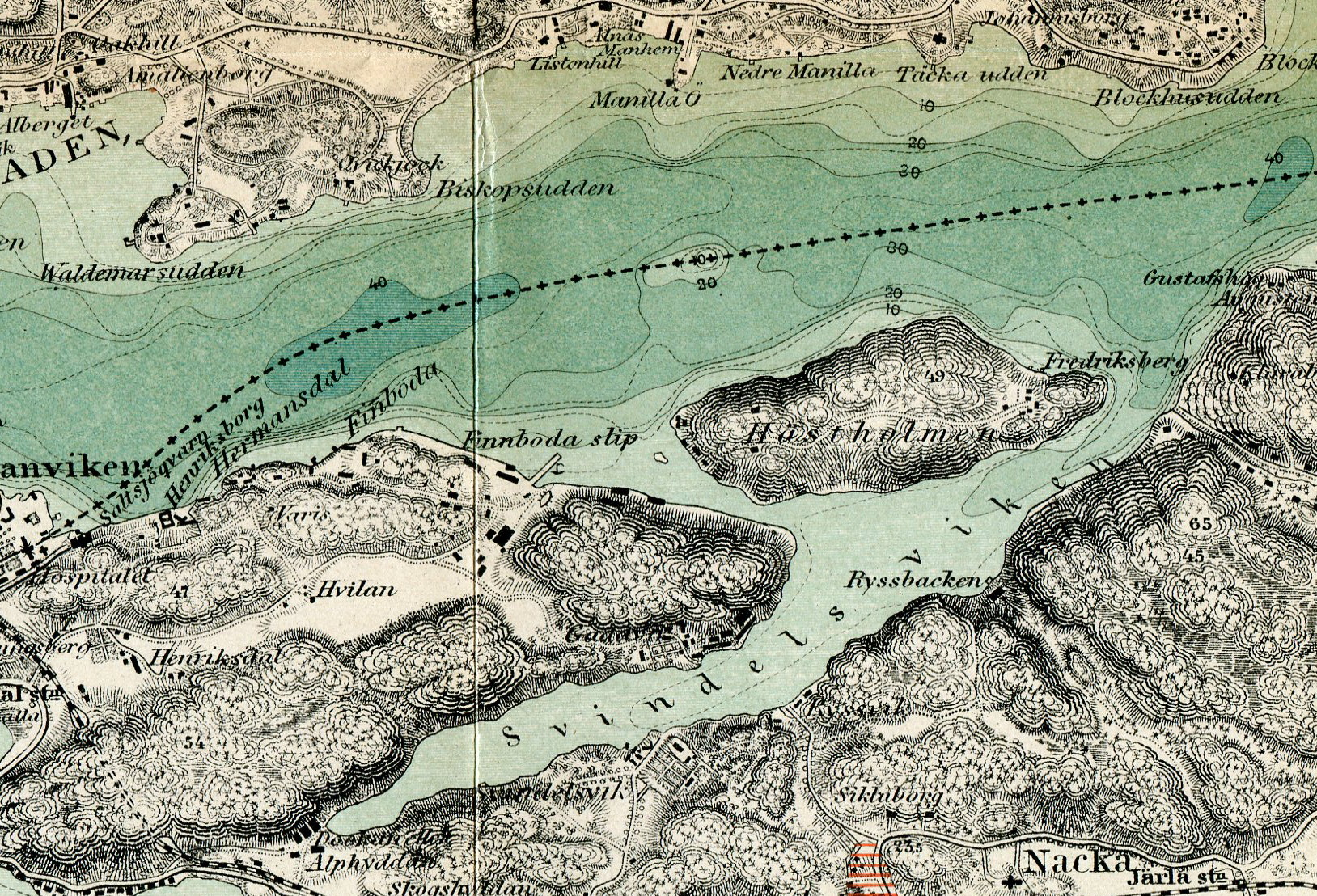 Del av "Höjd- och djupkarta öfver Stockholm och närmaste omgifningar".